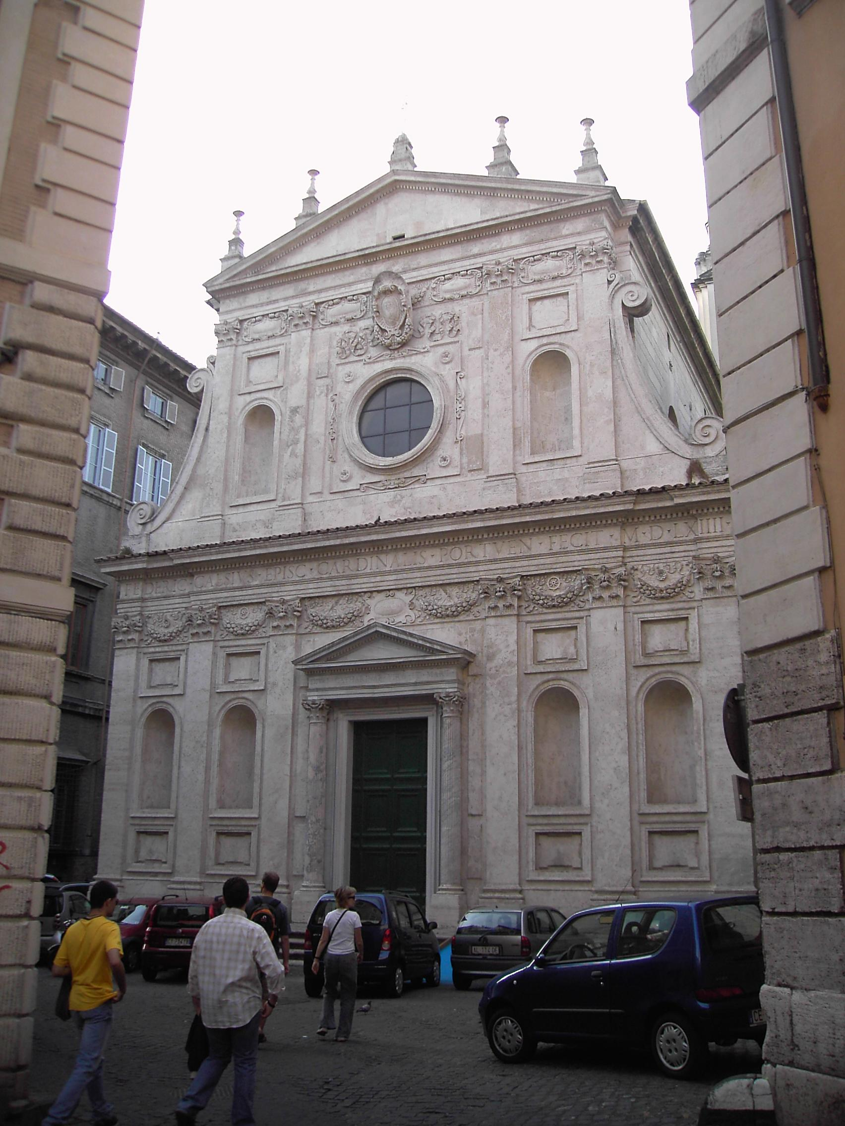 Roma , santa Caterina dei Funari (rione XI, S. Angelo)